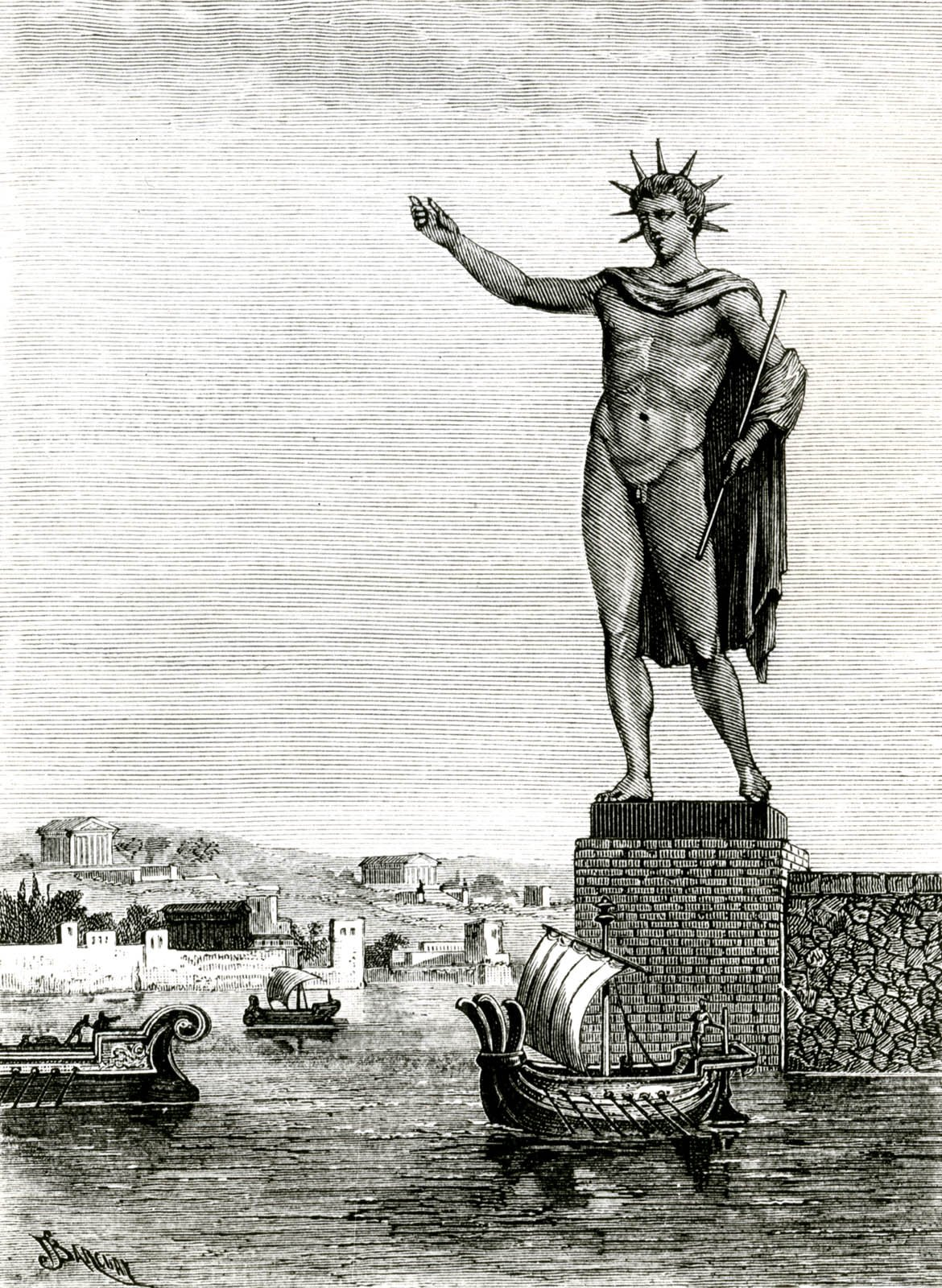 Le colosse de Rhodes, selon gravure du XIXè siècle